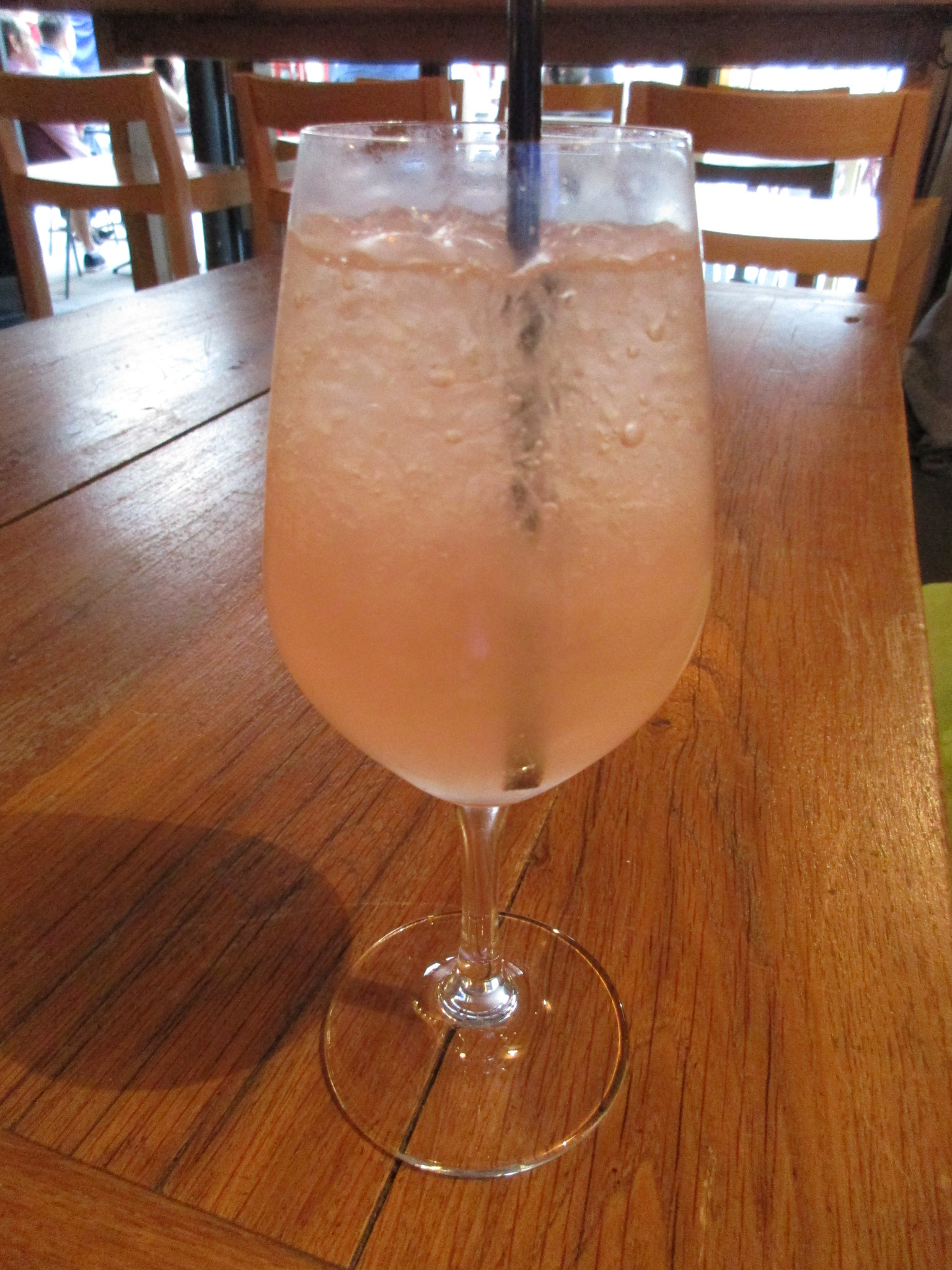 Mort dans l'après-midi ( la couleur orangée vient d'un effet d'éclairage local du bar )